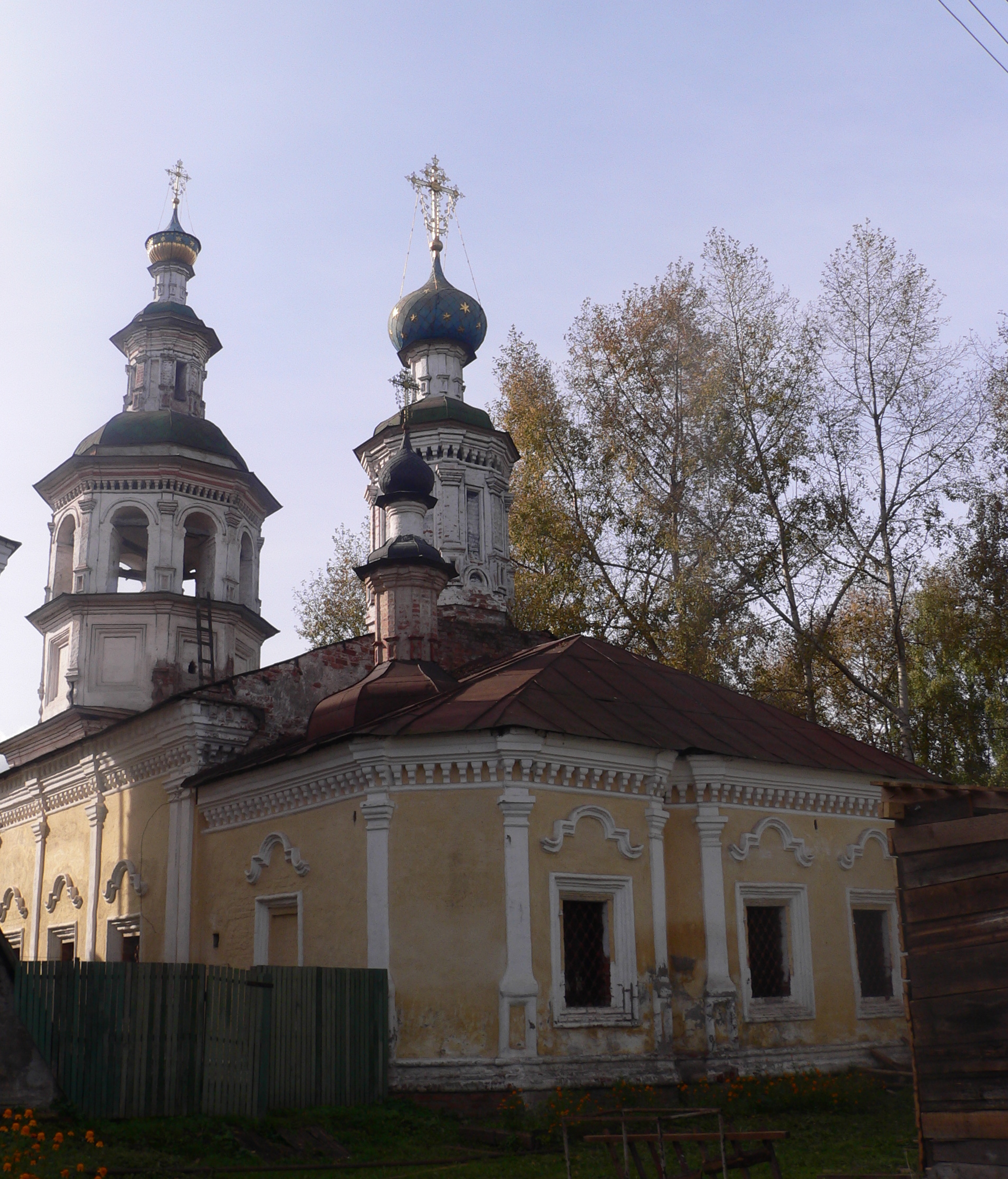 Холодный храм церкви Дмитрия Прилуцкого в Вологде